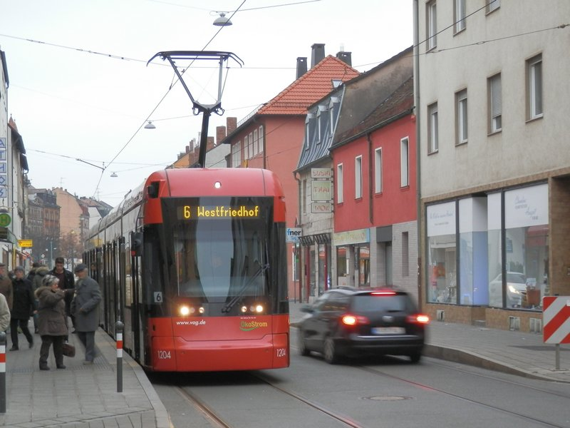 Straßenbahnzug 1204 (Variobahn) an der Haltestelle Julienstraße in Nürnberg